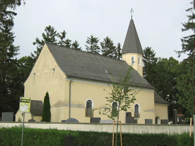 Glinzendorf, Niederösterreich, Österreich